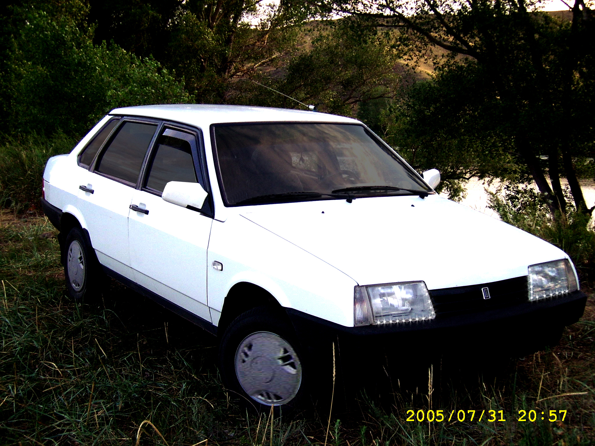 Мой автомобиль Лада Самара